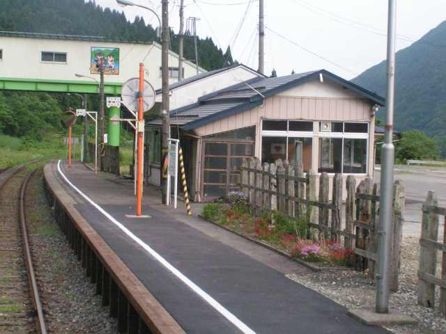 Takaya Station, Tozawa, Yamagata, Japan